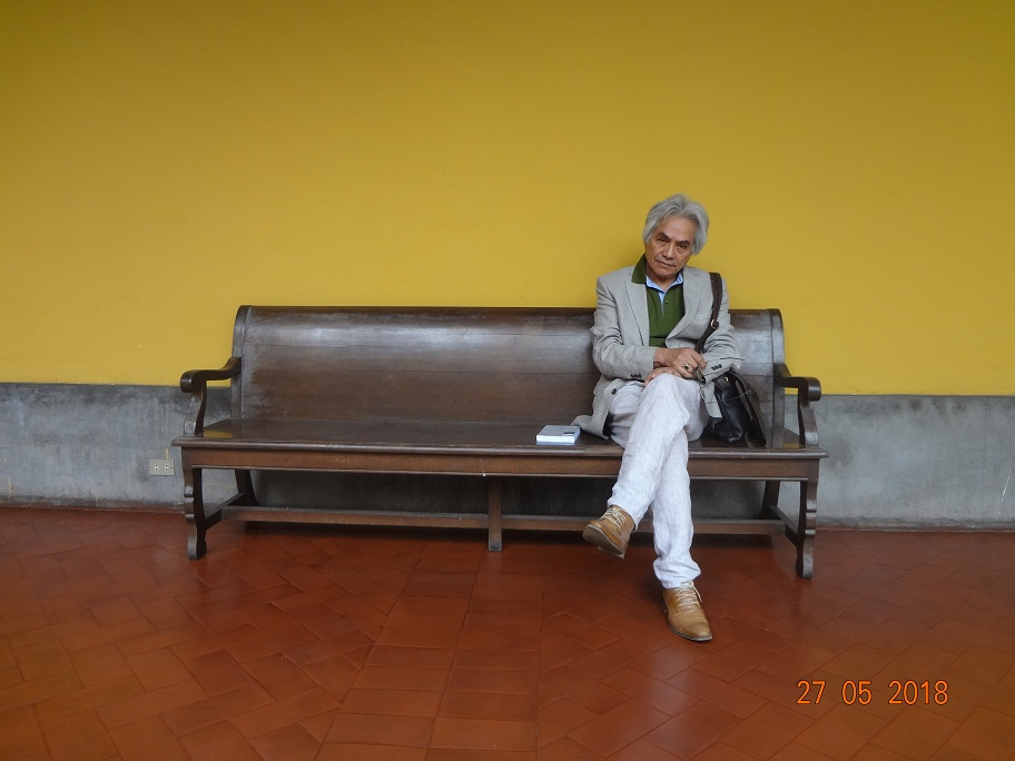 Ricardo Paredes en la Casona de San Marcos, Lima - Perú